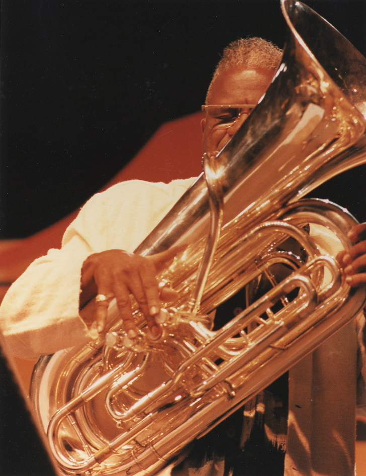 Bob Stewart